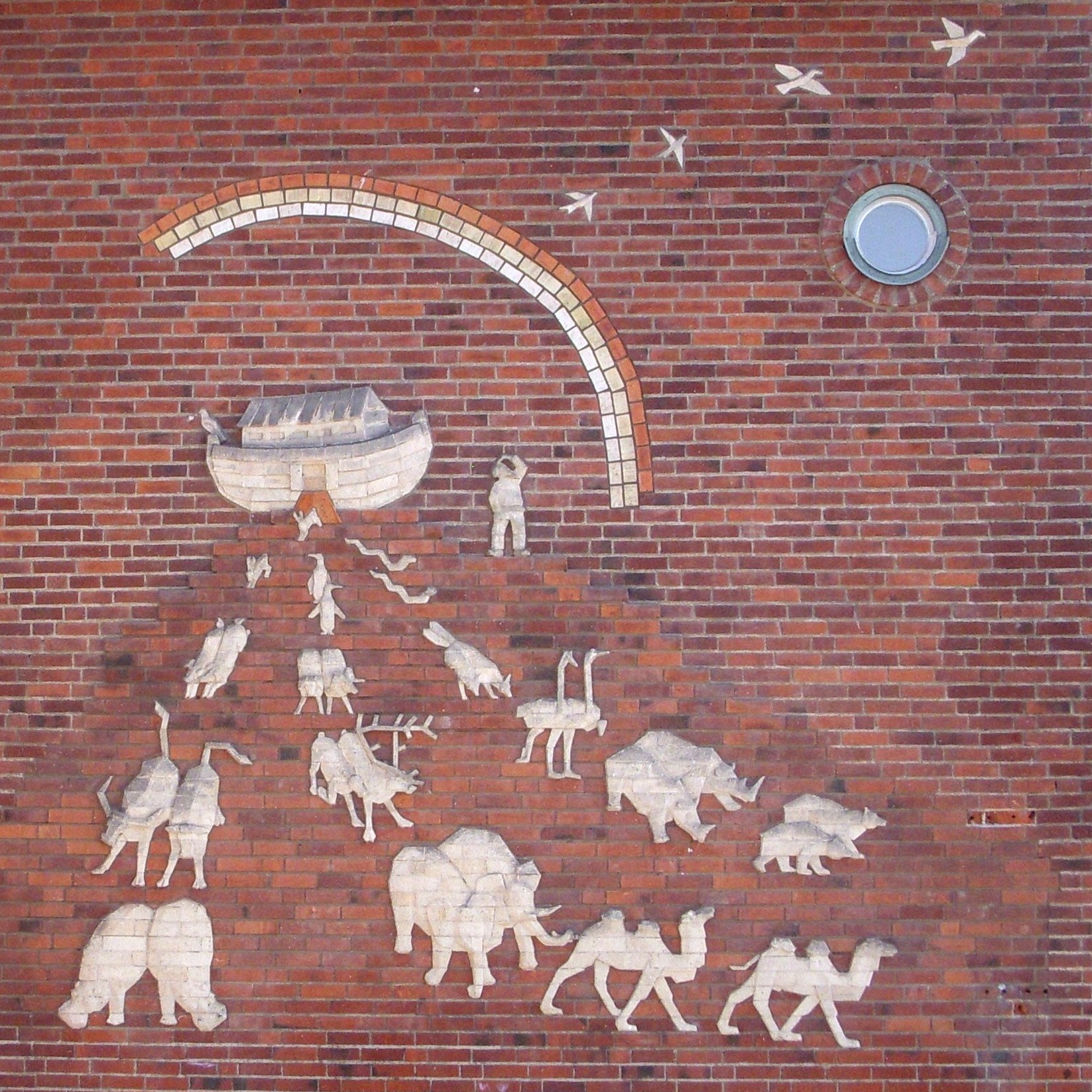 Sköndalsskolan, arkitekt Cyrillus Johansson, fasadutsmyckning av Allan Wallberg